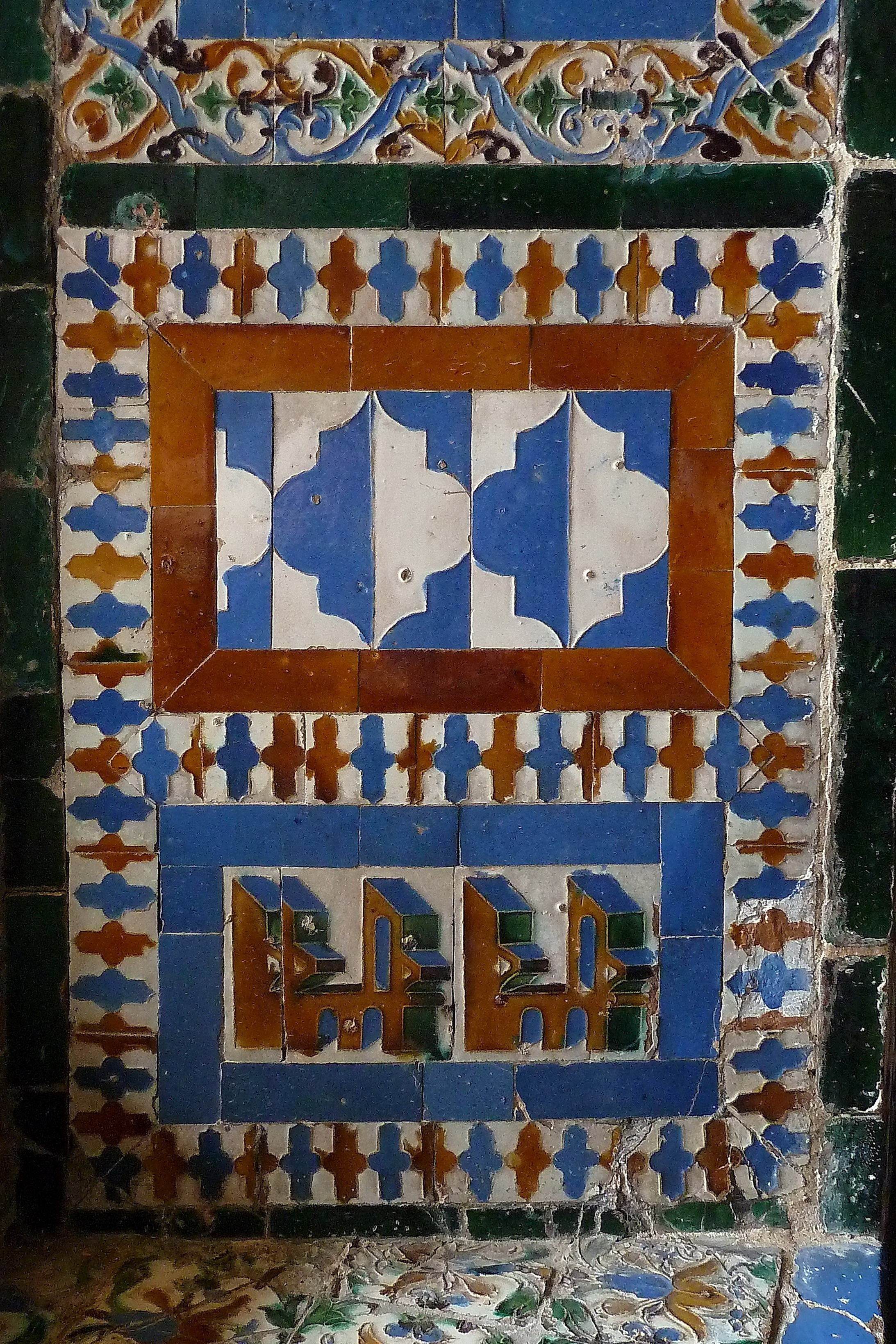 Fliesen im Casa de Pilatos in Sevilla, Spanien